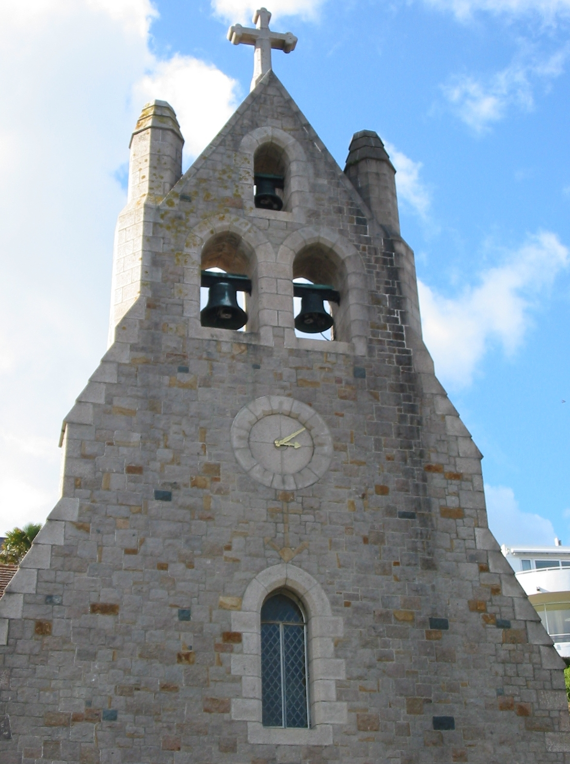 Nrf: Jèrri Nrf: Églyise Catholique, Saint Aubîn, Jèrri